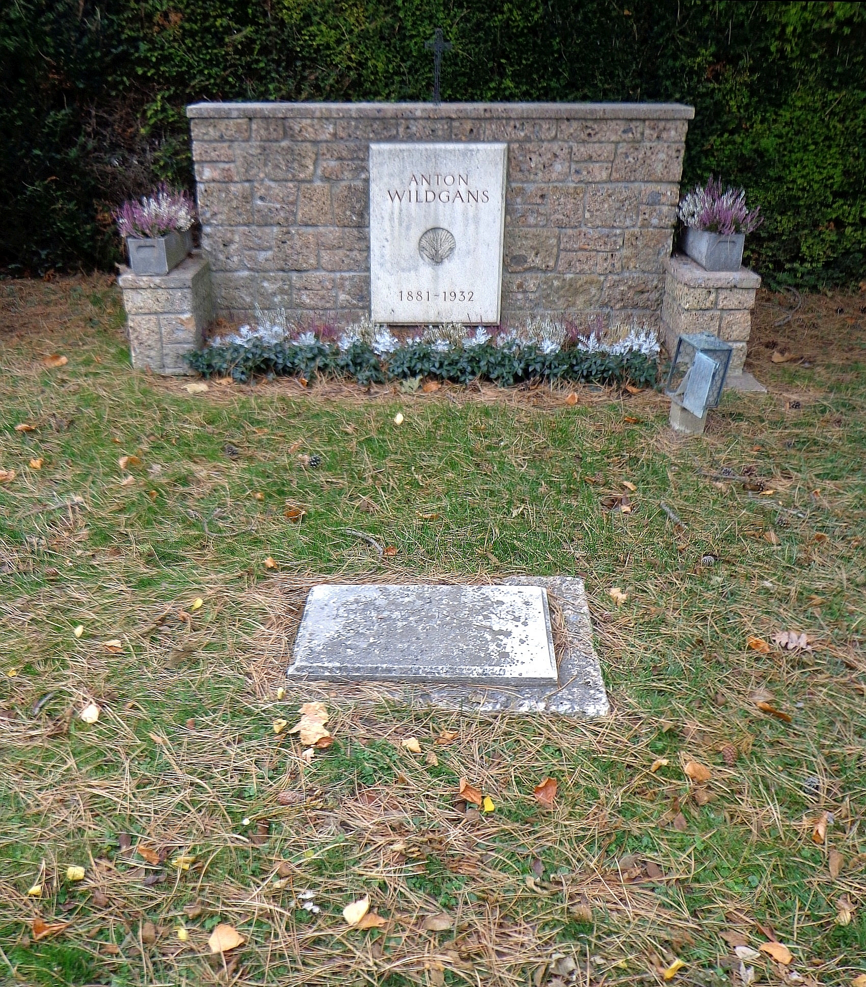 Wiener Zentralfriedhof - Gruppe 14C, Ehrengrab von Anton Wildgans